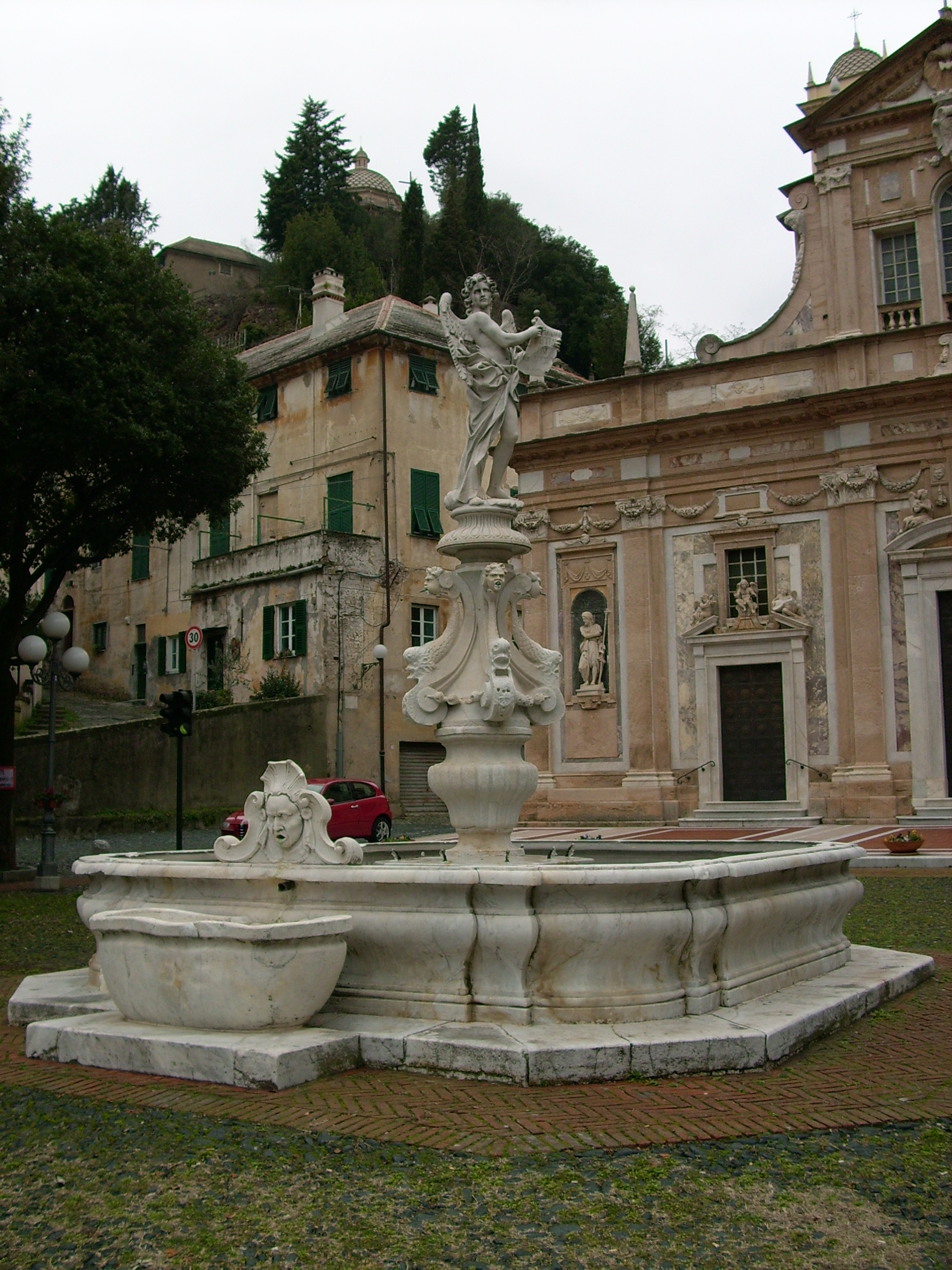 Santuario di Nostra Signora della Misericordia, Savona, Liguria, Italy